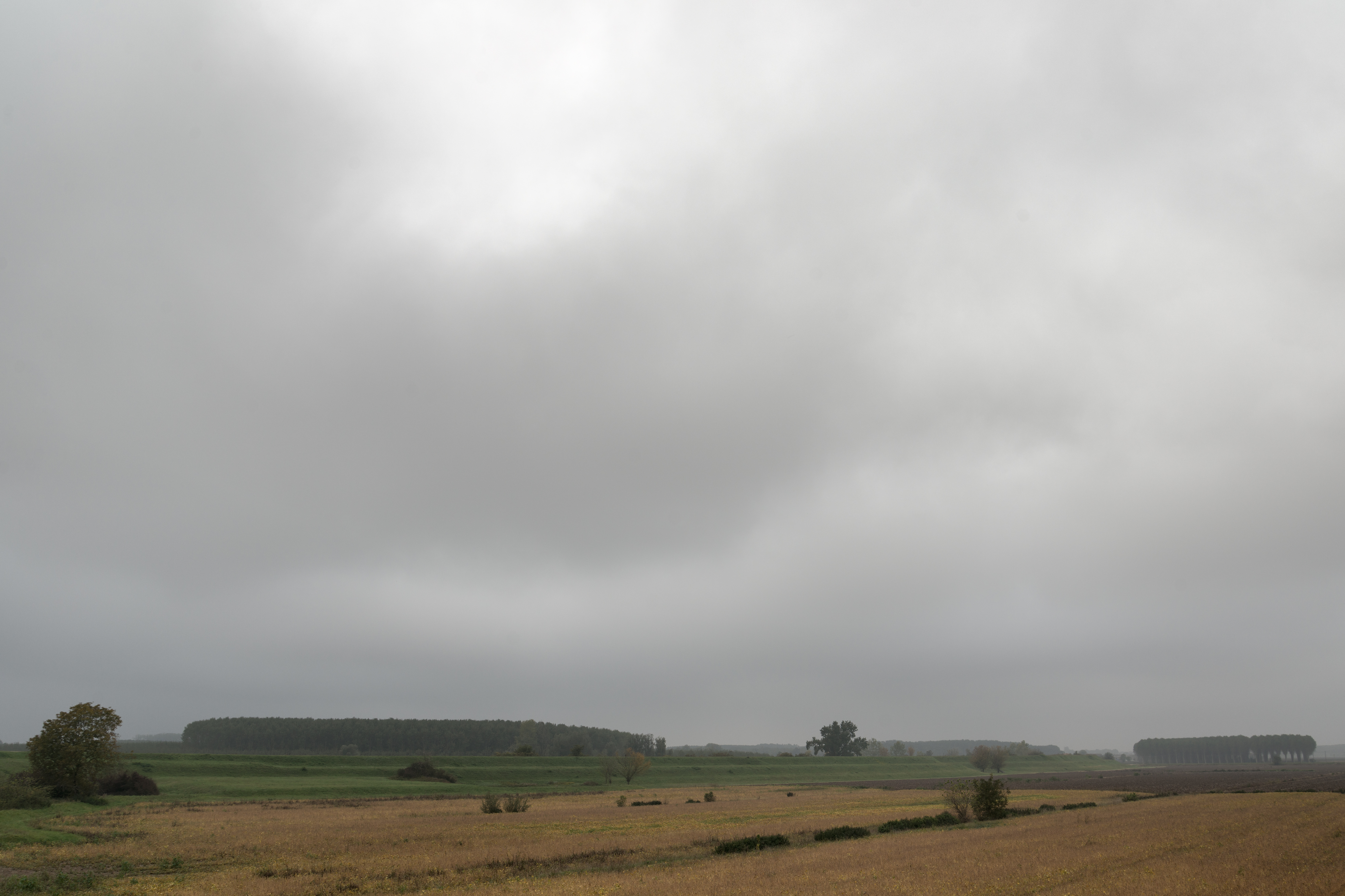 Pioppi - Strada Argine Oglio, Marcaria, Mantova, Italia